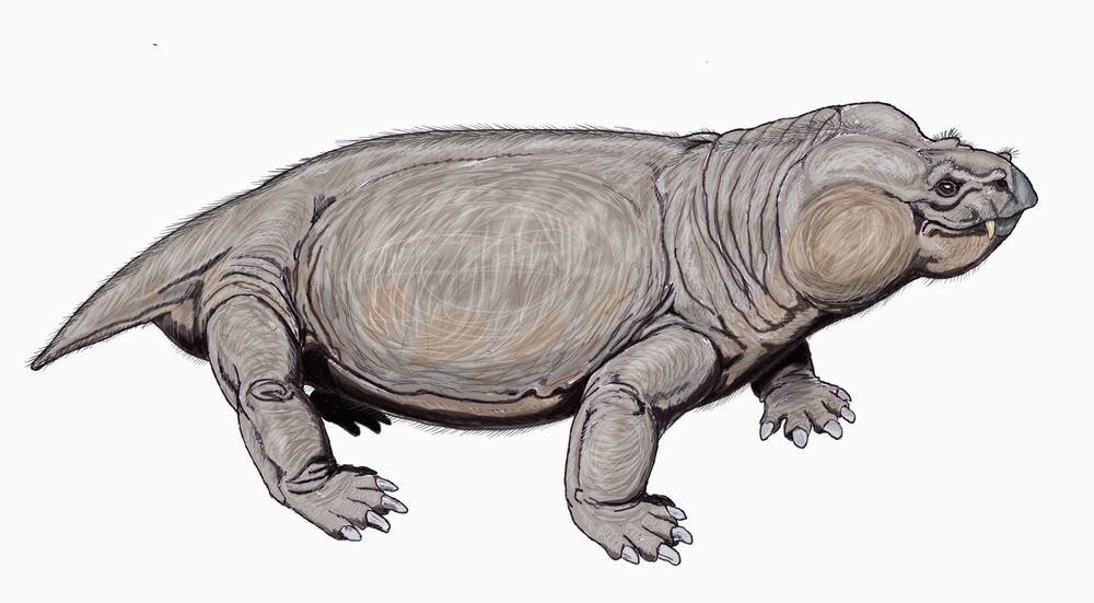 Aulacocephalodon baini